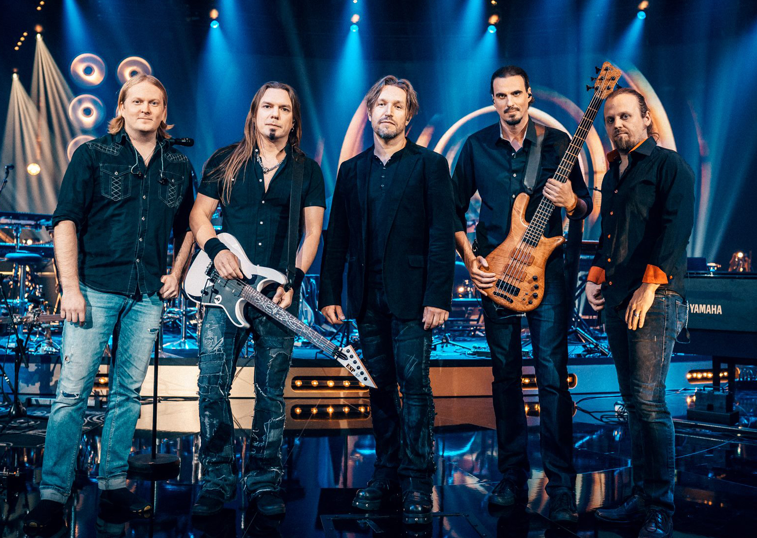 Sonata Arctica: Formación actual